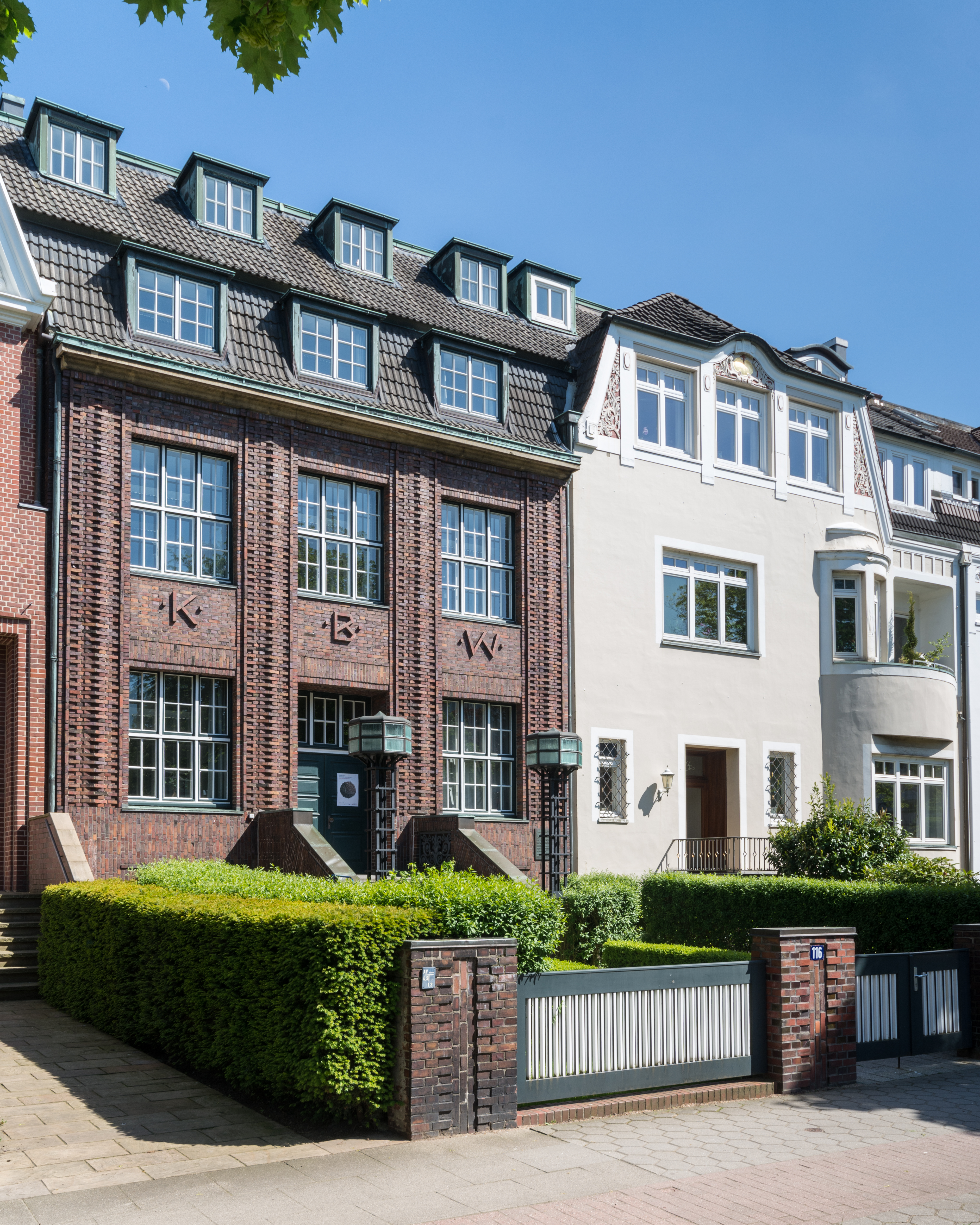 Ensemble Warburg-Haus, Heilwigstraße 114, 116 in Hamburg-Eppendorf. This is a photograph of an architectural monument.